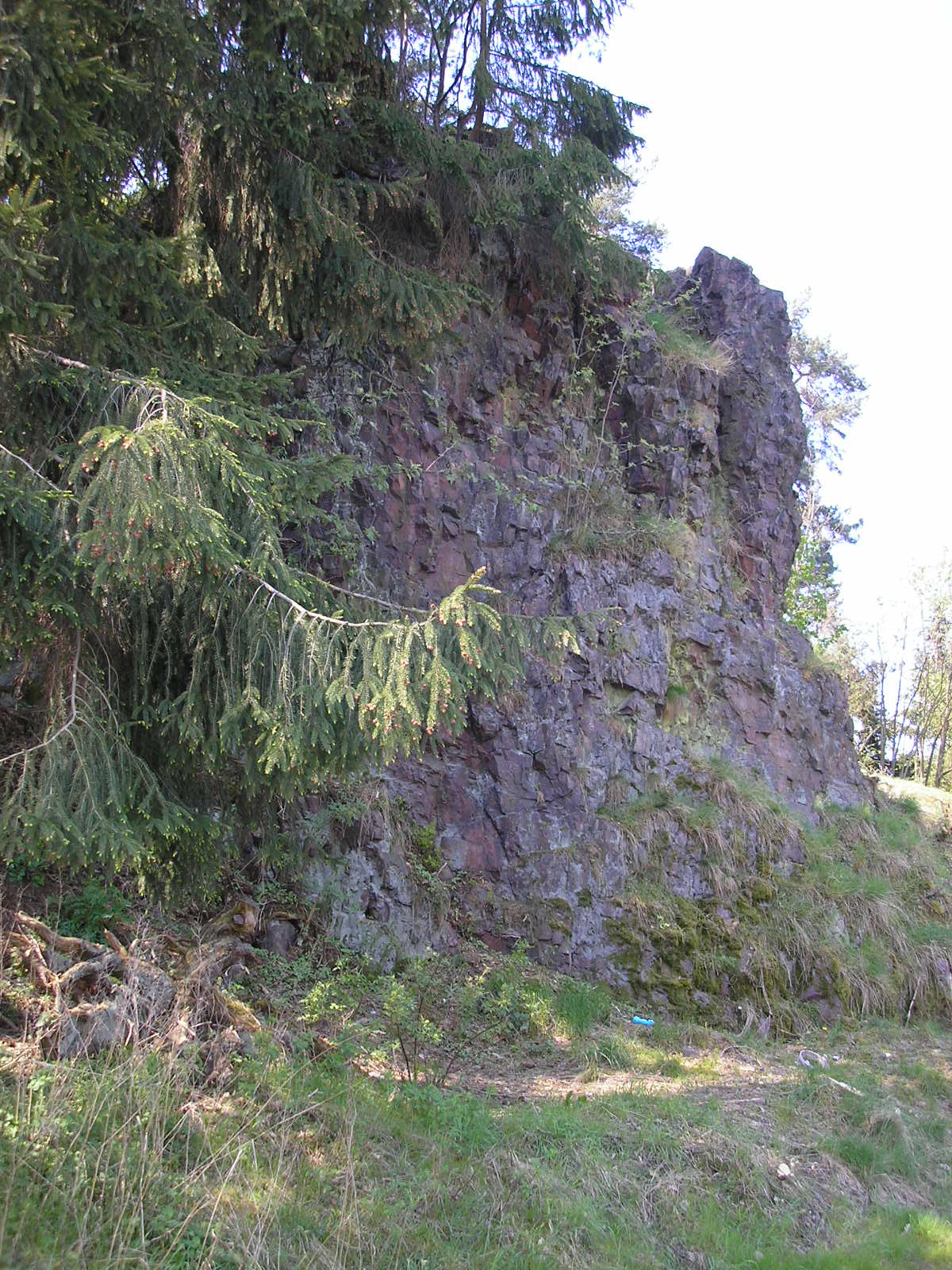 Felsen "Burgstein" am Südhang des Ilmtals bei Langewiesen.